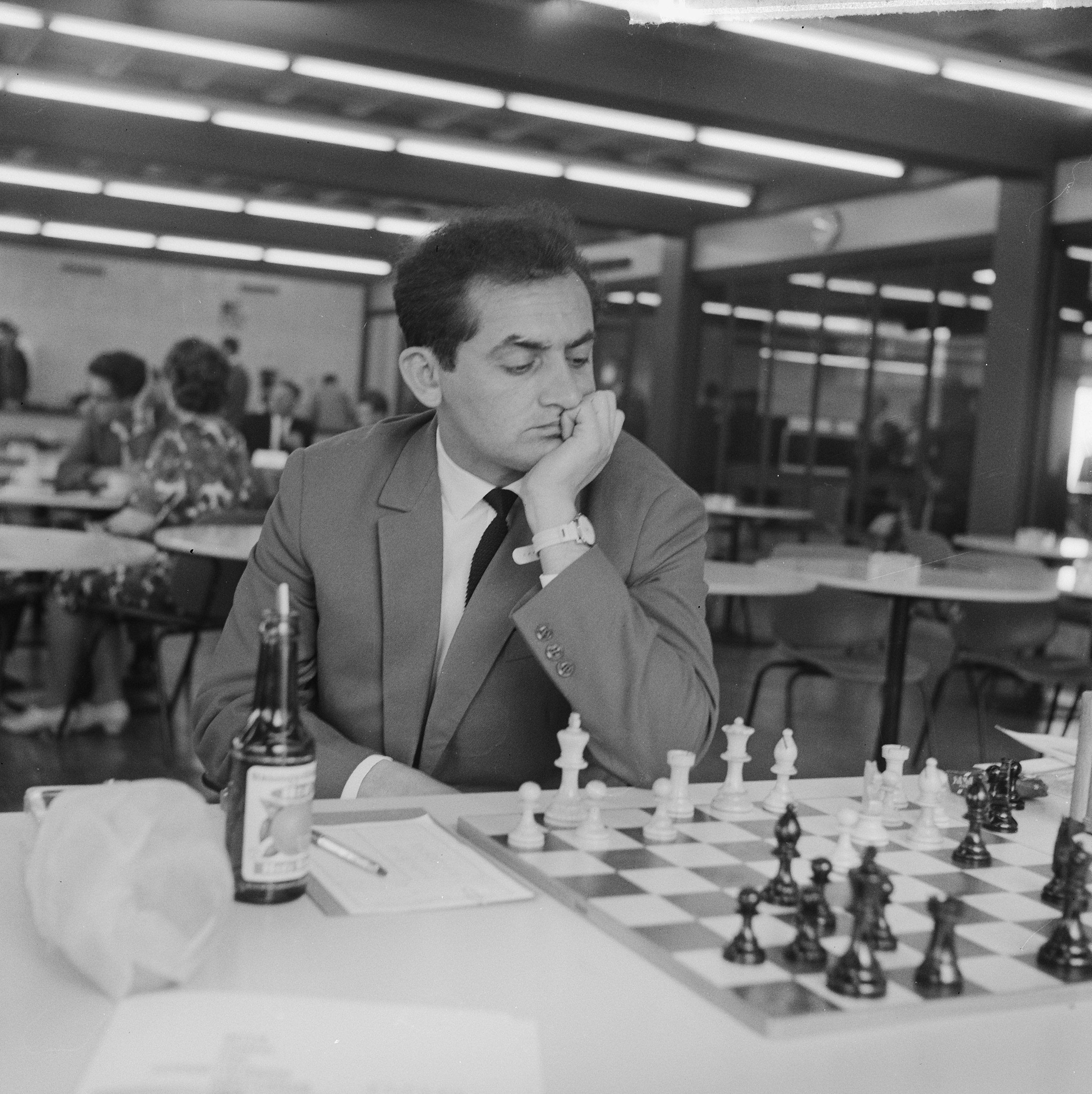 Collectie / Archief : Fotocollectie Anefo Reportage / Serie : [ onbekend ] Beschrijving : Interfide schaaktoernooi in GAK gebouw, Stein Datum : 21 mei 1964 Trefwoorden : SCHAAKTOURNOOIEN Instellingsnaam : GAK Fotograaf : Broers, F.N. / Anefo Auteursrechthebbende : Nationaal Archief Materiaalsoort : Negatief (zwart/wit) Nummer archiefinventaris : bekijk toegang 2.24.01.03 Bestanddeelnummer : 916-4589